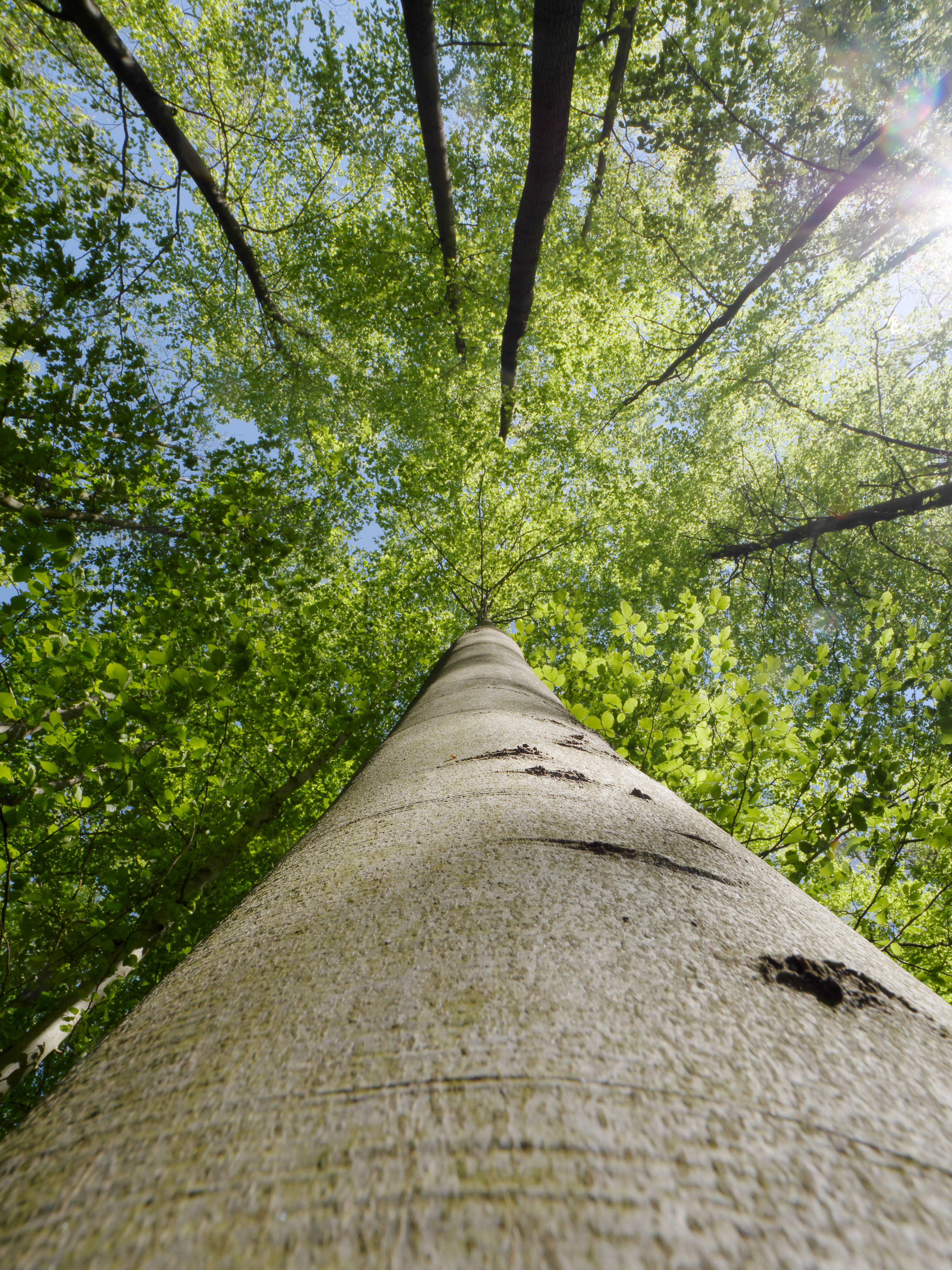 Nationalpark Hainich, Thüringen, Deutschland, Buche im Kerngebiet des UNESCO Weltnaturerbes der alten europäischen Buchenwälder